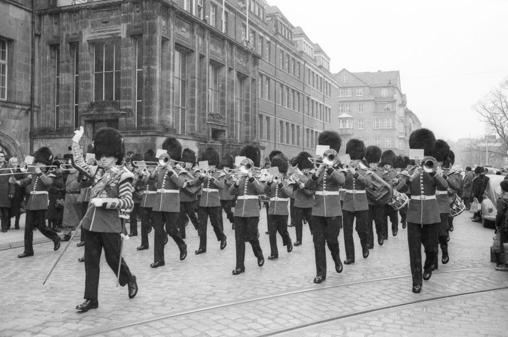 Regimentskapelle der Grenadier Guards auf dem Rathausplatz.